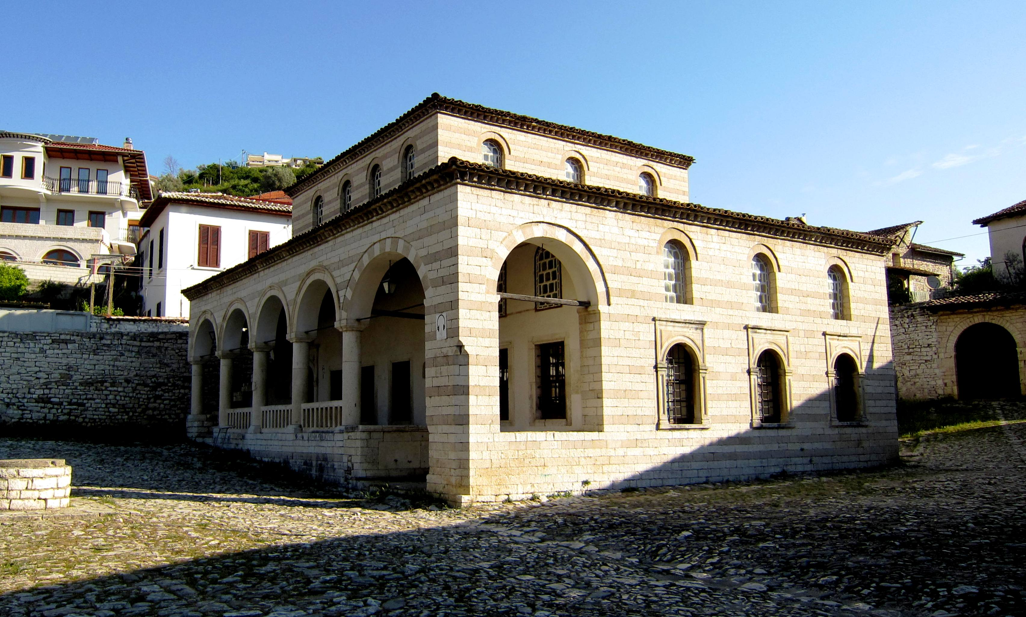 Die Halveti-Tekke (Teqeja e Helvetive) des Sufiordens Halveti, Berati